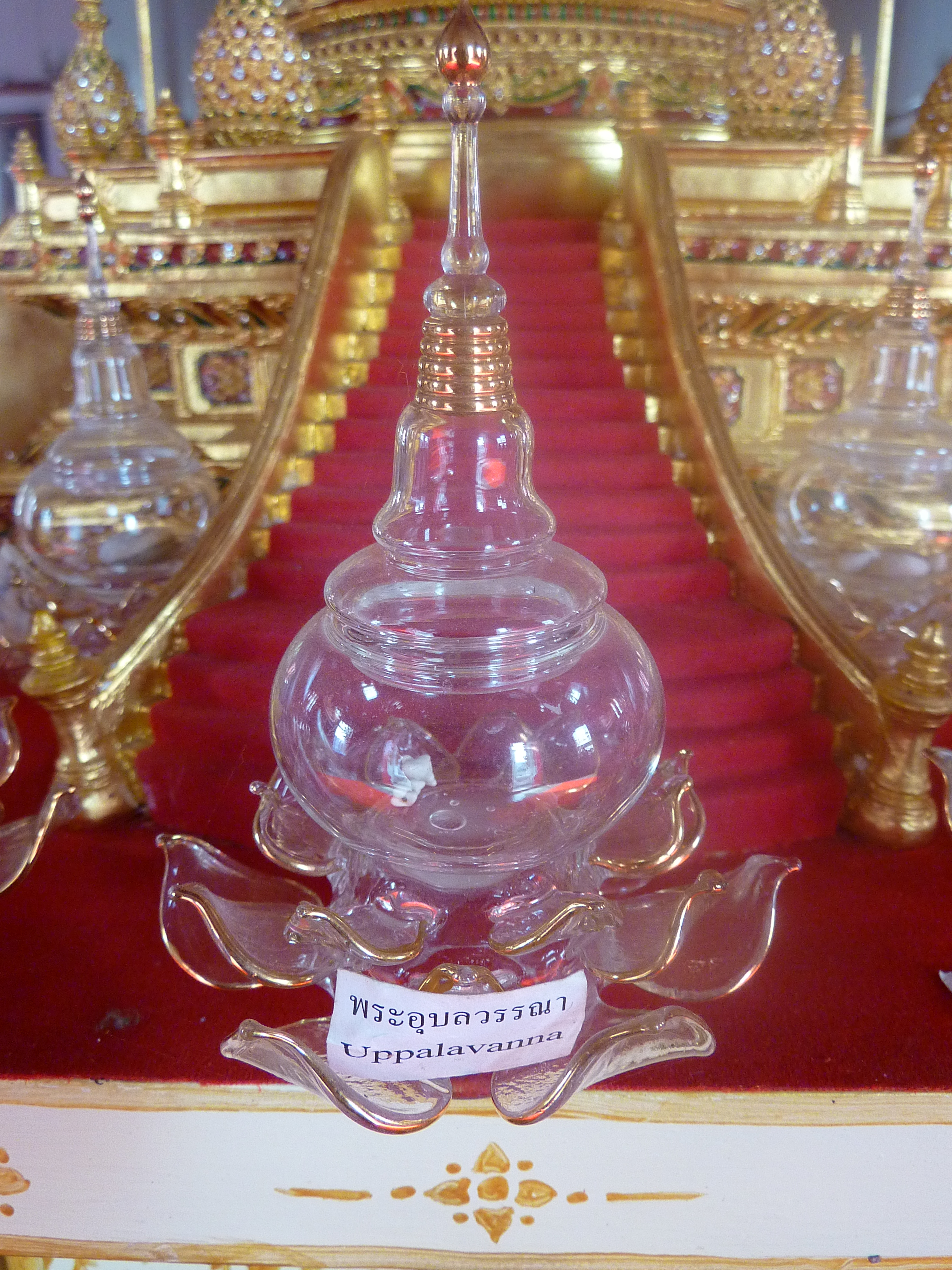 Wat Rachatiwat, Bangkok